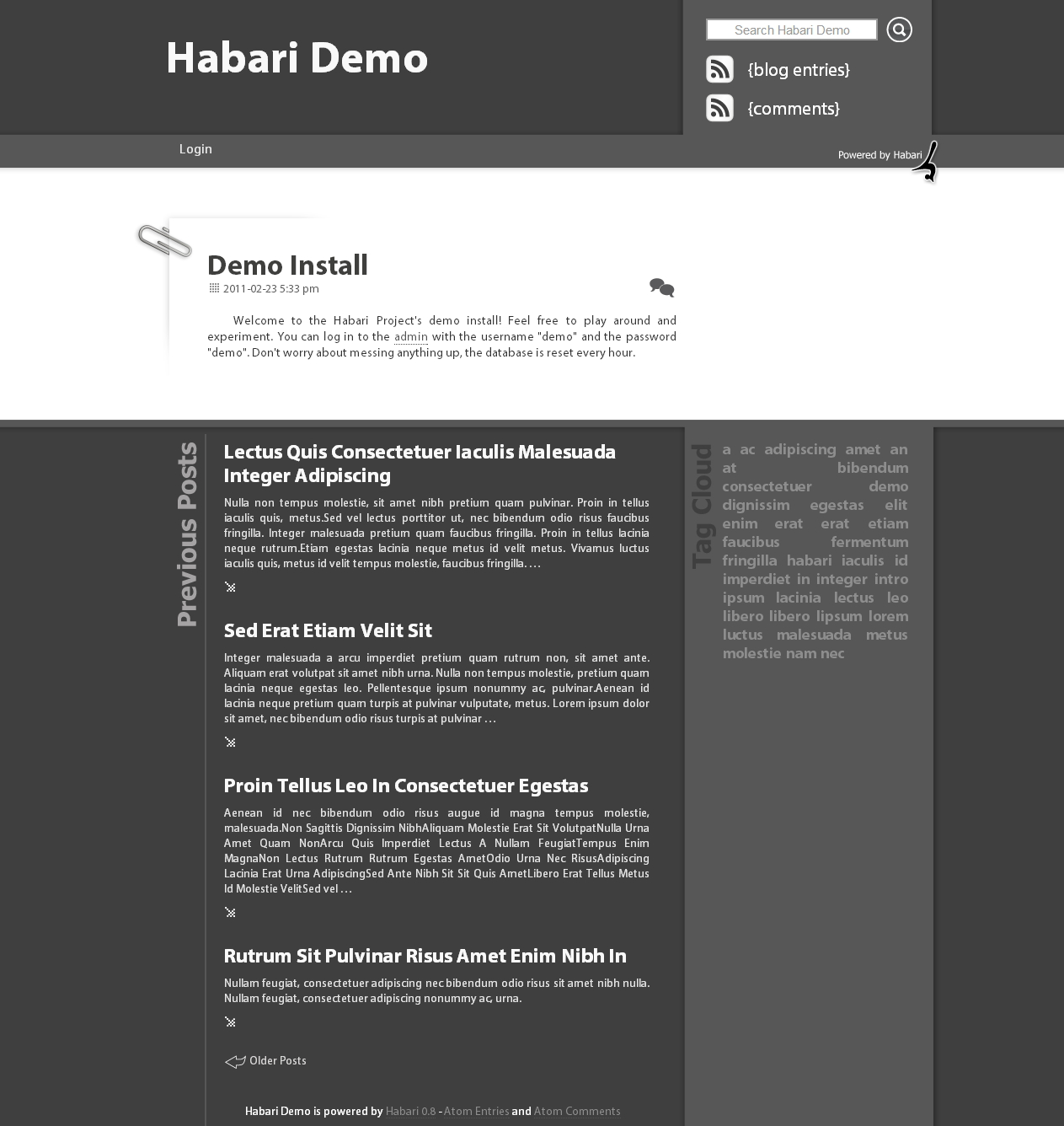 Вид главной страницы блога на habari